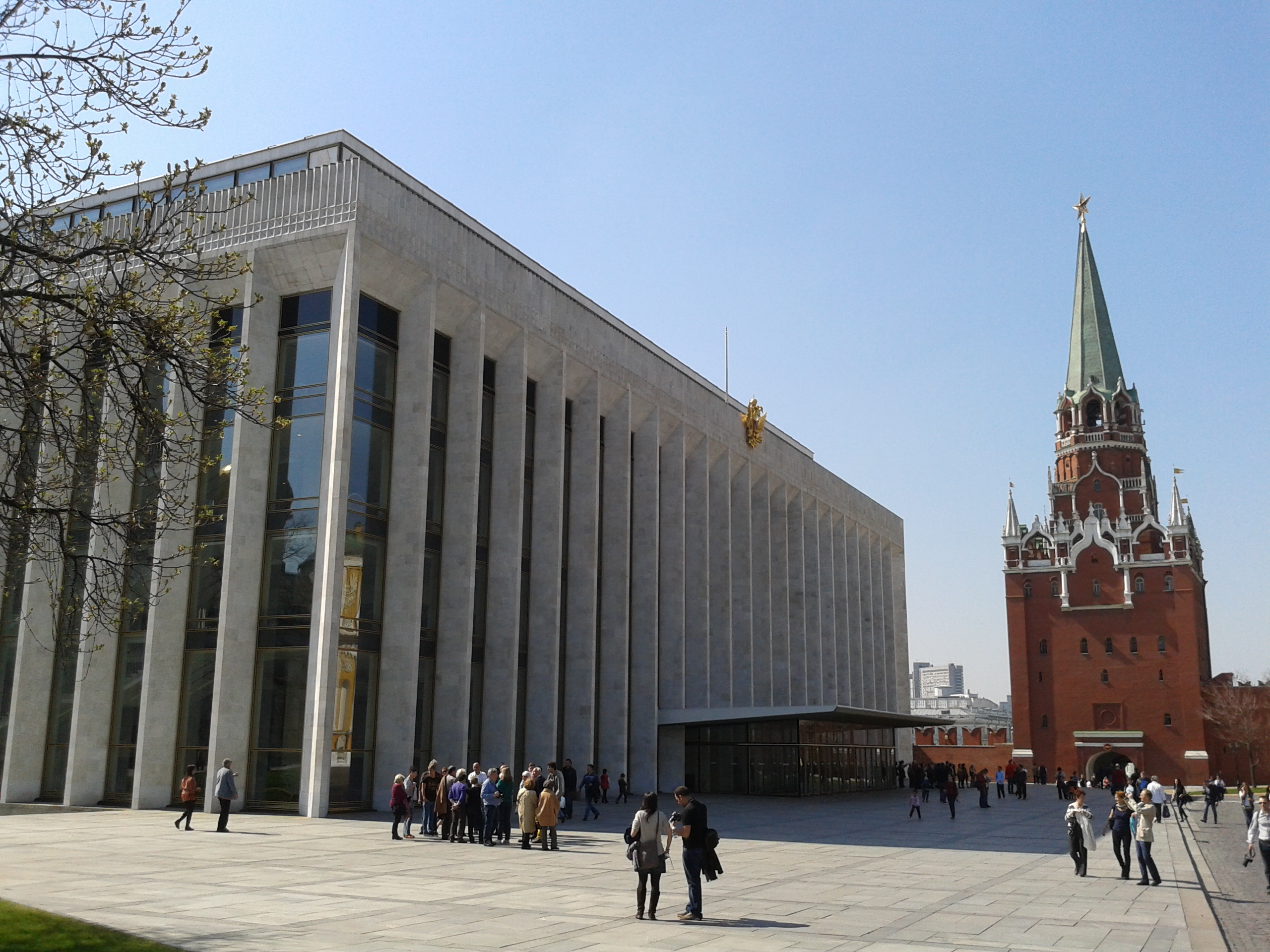 Московский Кремль. Государственный Кремлёвский дворец (справа-Троицкая башня)